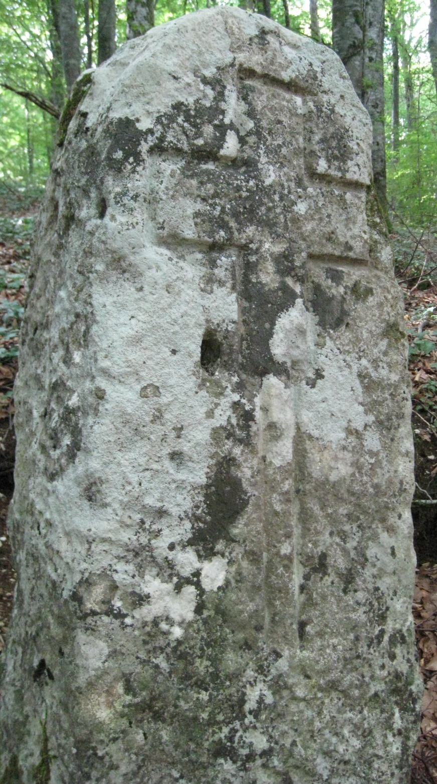 Borne de justice, à la limite du territoire de Bure-les-templiers